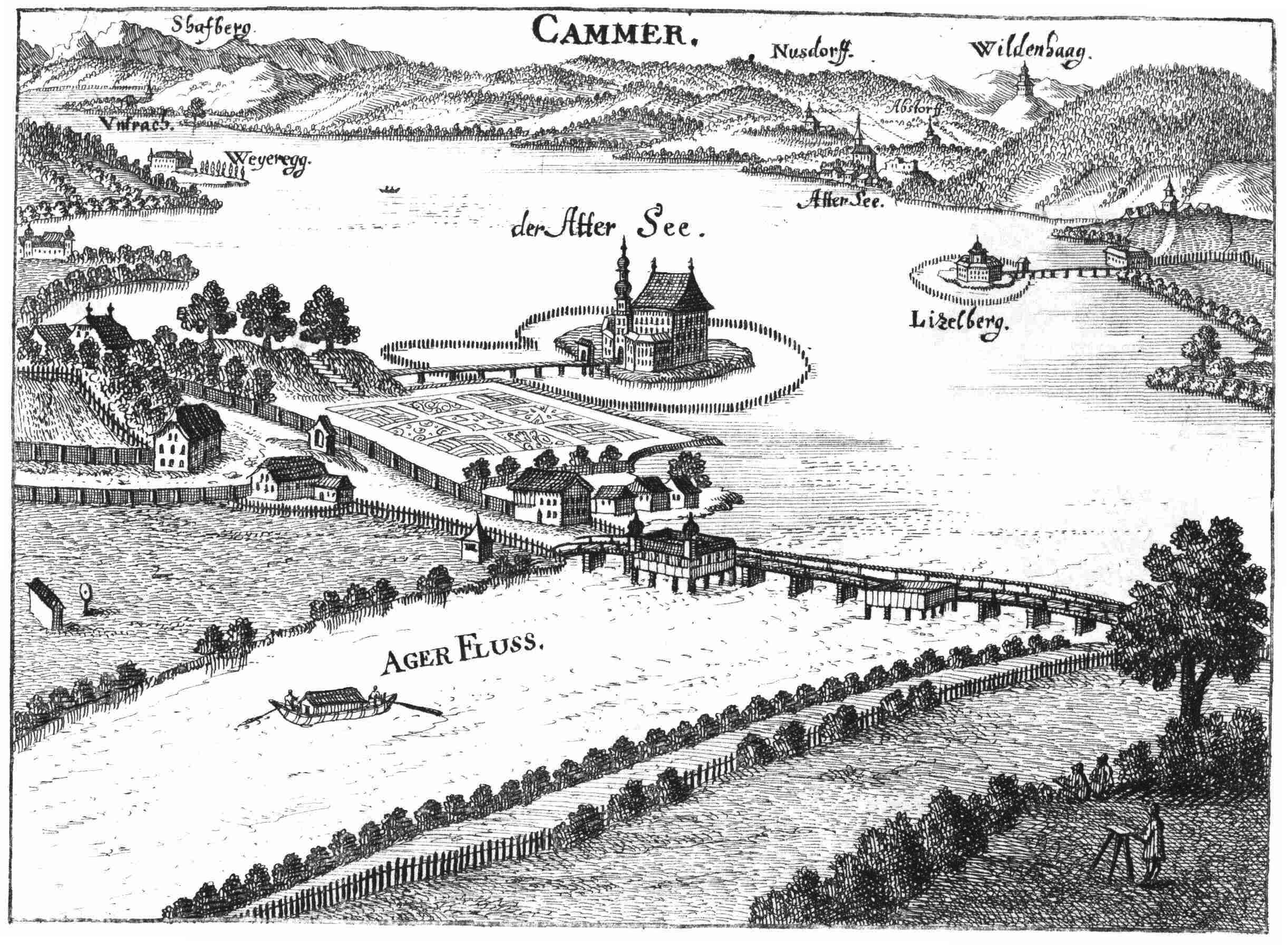 Schloss Kammer und der Attersee nach einem Stich von Georg Matthäus Vischer von 1674